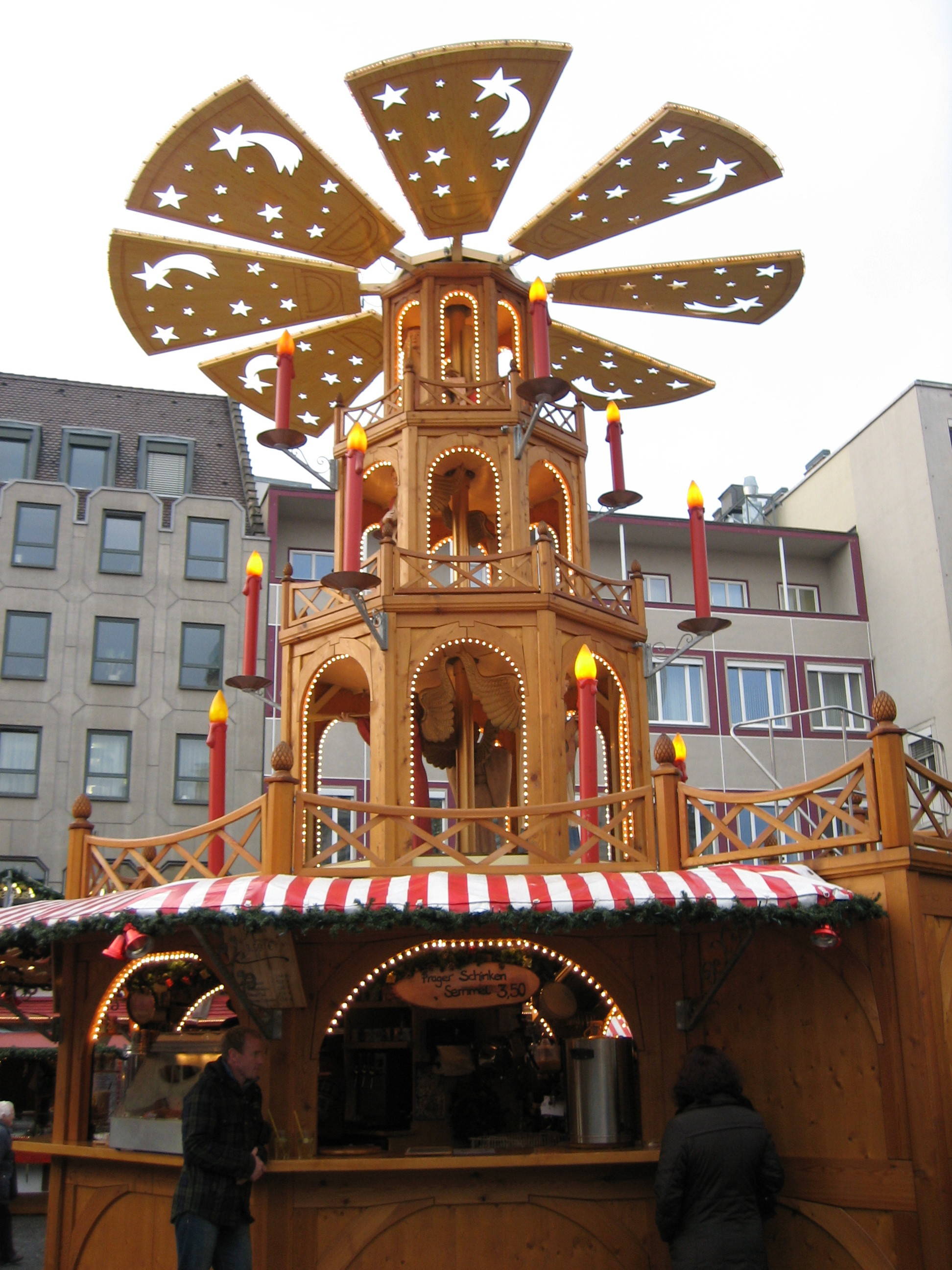 Christkindlesmarkt 2009 in Augsburg, Rathausplatz, Weihnachtspyramide